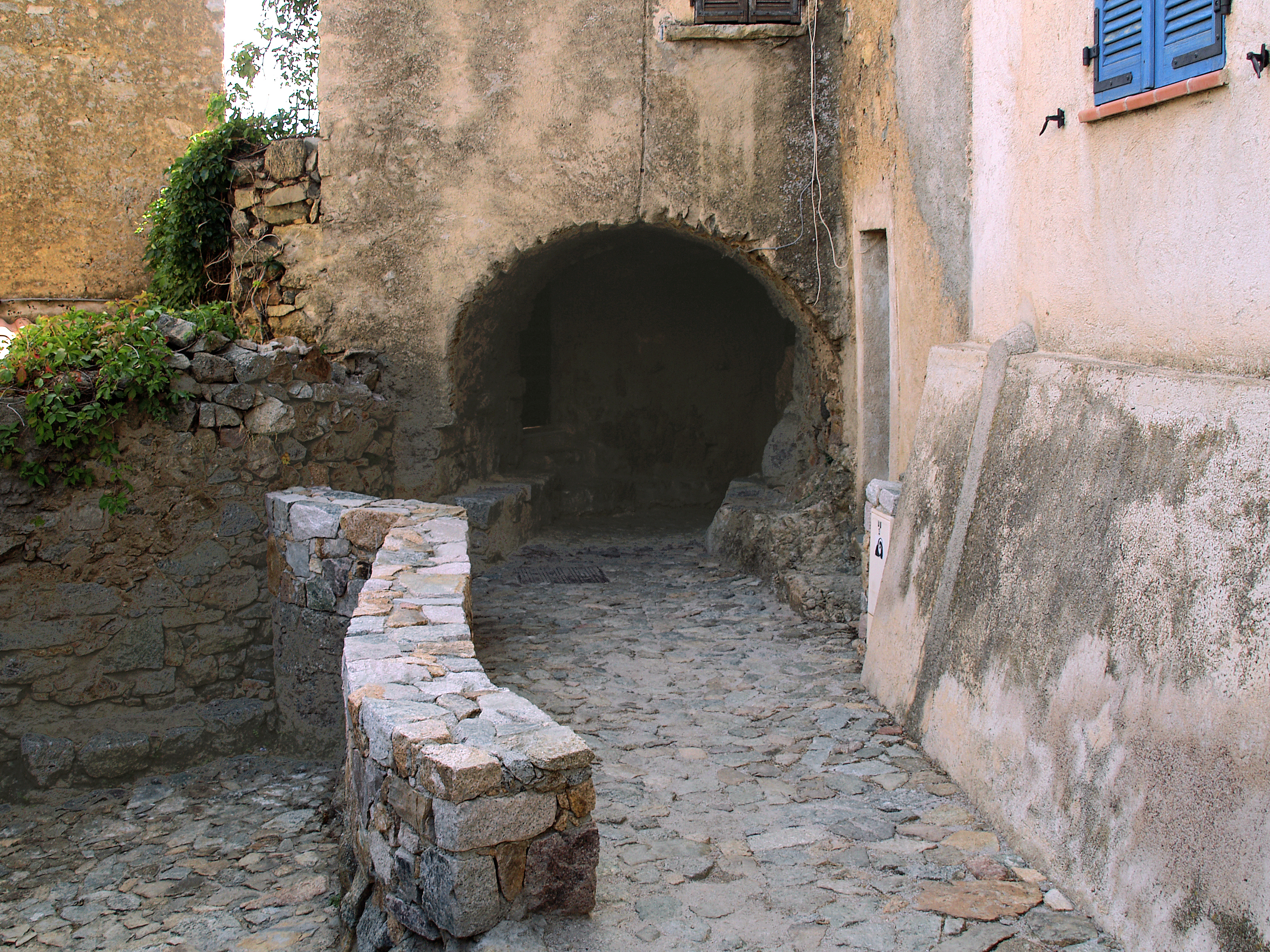 Sant'Antonino - Ruelles et galerie voûtées